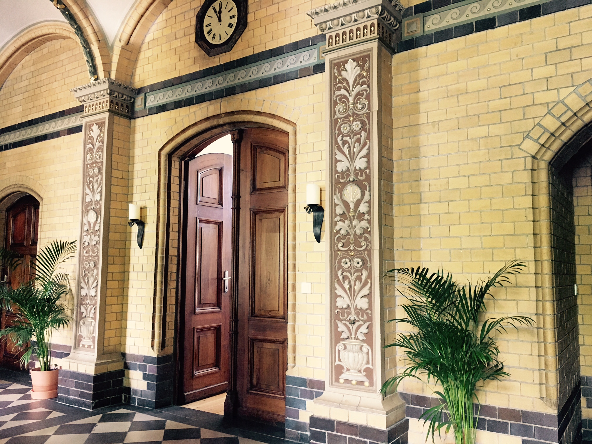 Ein Blick in das Foyer des Alten Standesamtes in der August-Bebel-Straße 29